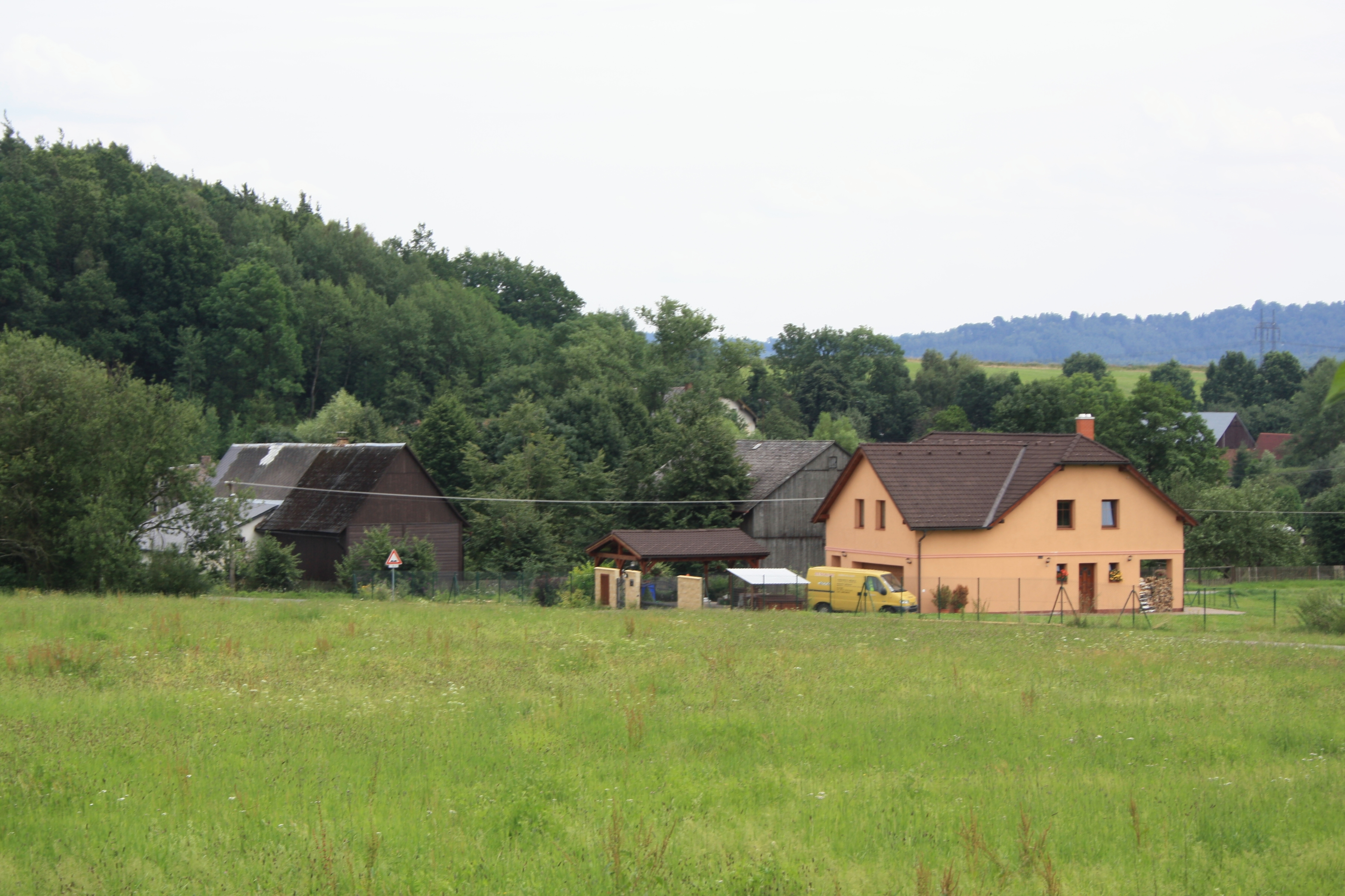 Dubnice